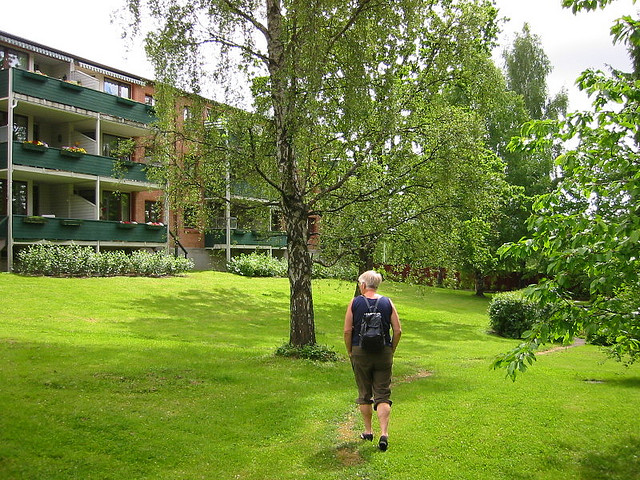 Lysehgan borettslag i Oslo